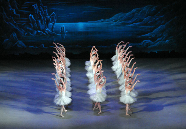 Swan Lake ballet